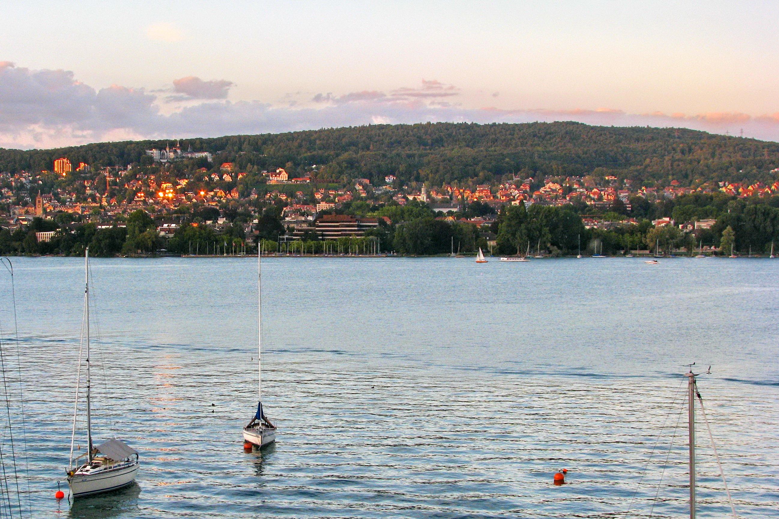 Adlisberg in Zürich (Switzerland) as seen from Wollishofen quarter